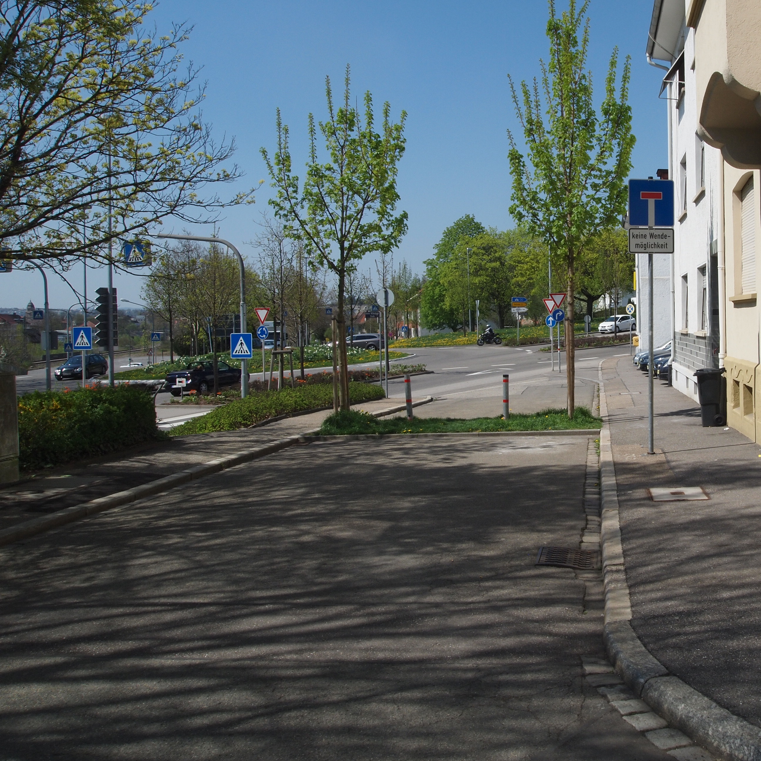 Westliches Ende der Kaiser-Wilhelm-Straße in Pforzheim. Seit dem Bau des Kreisverkehrs an der Wilferdinger Straße ist die Ausfahrt geschlossen.